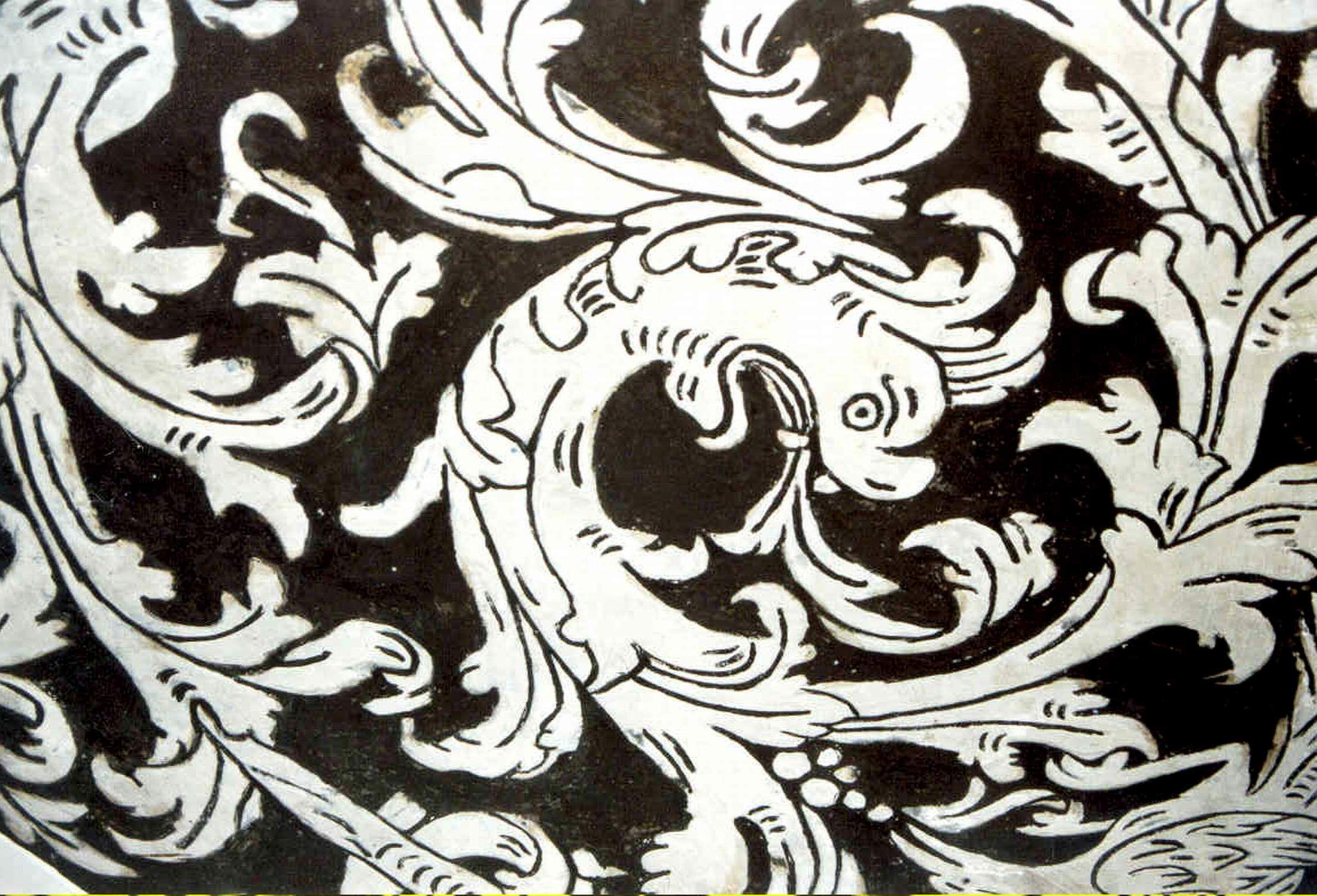 Detalle de esgrafiado en la iglesia parroquial de Vallanca (Valencia).